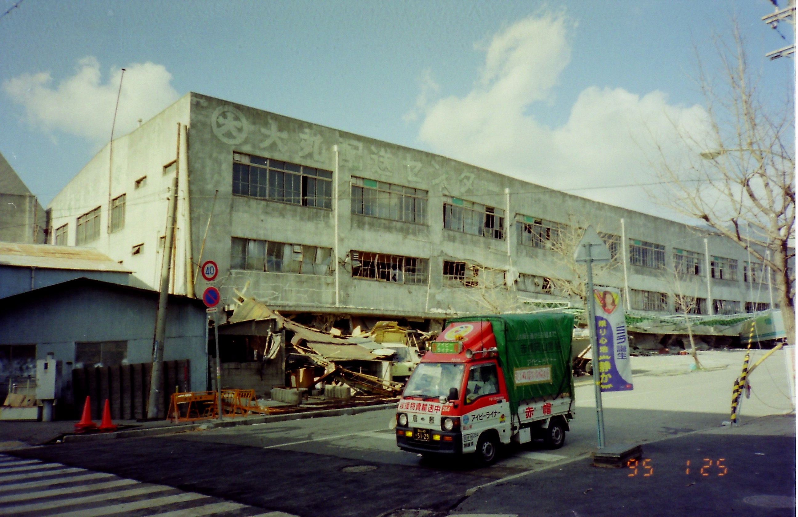 神戸市灘区内にあった大丸百貨店の神戸配送センターが、1月17日の大地震により一階部分が完全に押し潰された様子と、岡山県からの救援物資を緊急輸送中の赤帽車。 震災後の間もない当時、瓦礫などで道路事情が悪い中でのこの様な軽四トラック類が非常に重宝され、運送業者の他、近隣県の各地からは冬の閑散期で余裕のあった農業団体からも、多くの軽四トラック類が動員された。